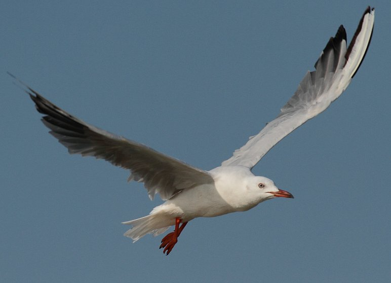 Gaviota picofina Chroicocephalus genei, La Algaida, Andalusia, Spain